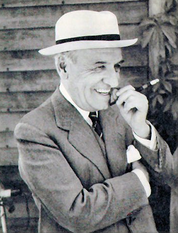 Ortega y Gasset en una fotografía tomada en Aspen (Estados Unidos) en 1948.